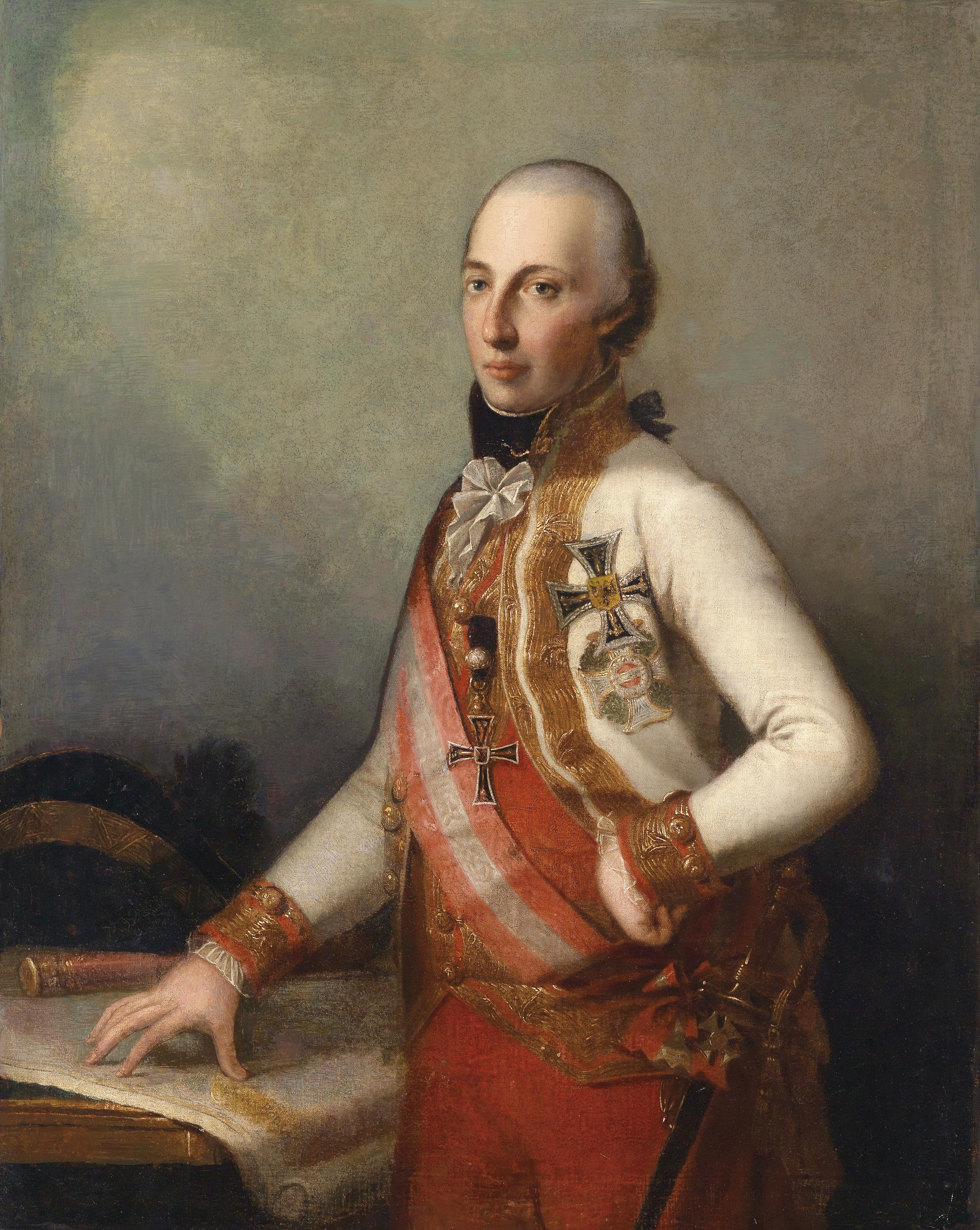 Feldmarschall Erzherzog Karl in Uniform mit dem Großkreuz des Militär-Maria Theresien-Ordens und den Insignien eines Hochmeisters des deutschen Ritterordens.